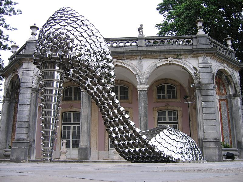 O sapato e os seus 150 tachos e respectivas tampas da marca Silampos, são em aço inoxidavel. Medidas - 150x430x270 cm. AUTORA da ESCULTURA - Joana Vasconcelos.